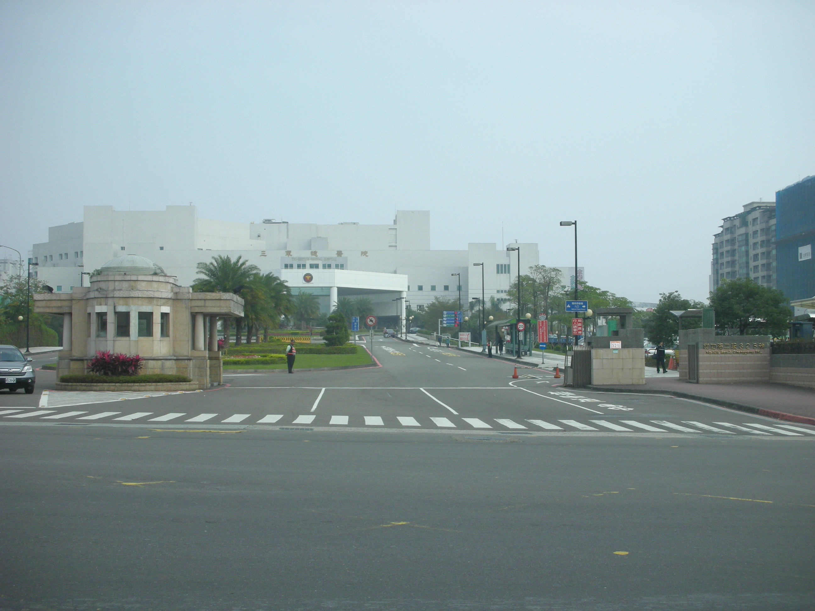 三軍總醫院內湖院區